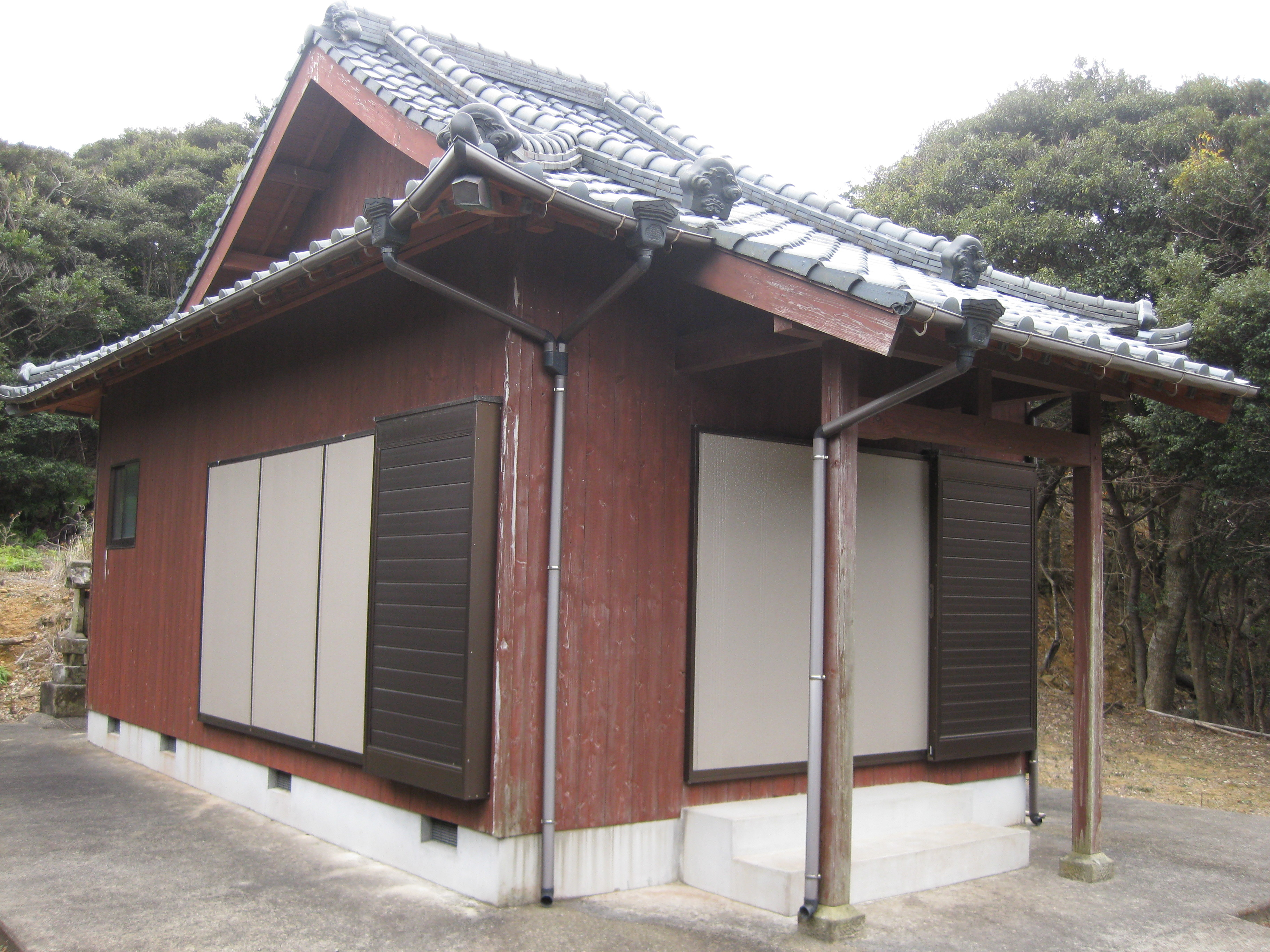 新上五島町間伏郷 頭子神社